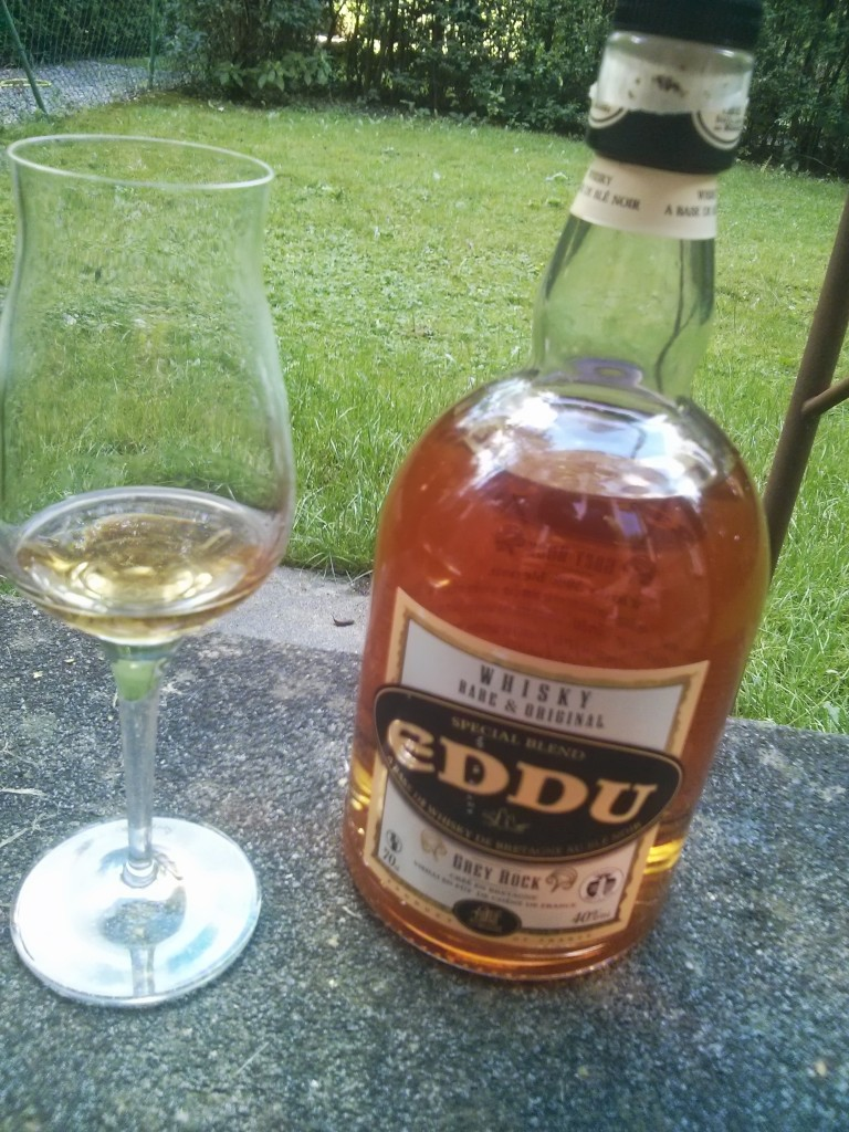 Eddu Greyrock bretonischer Whisky Blended Whisky 40% in meinem Garten